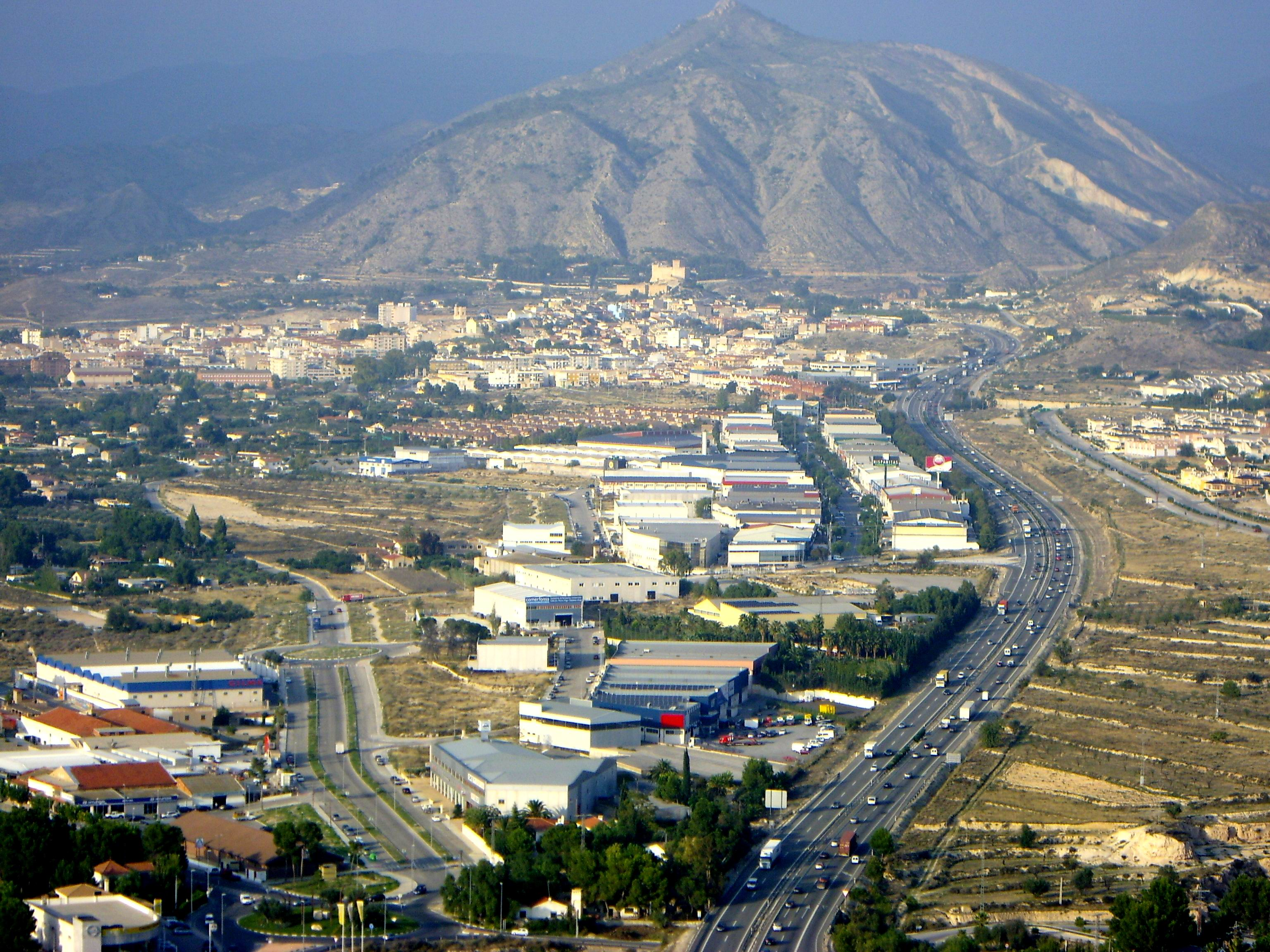 La A-31 circunvalando Elda